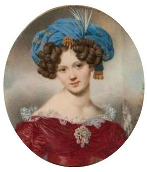 Графиня Варвара Петровна Шувалова, ур. Шаховская (1796-1870)